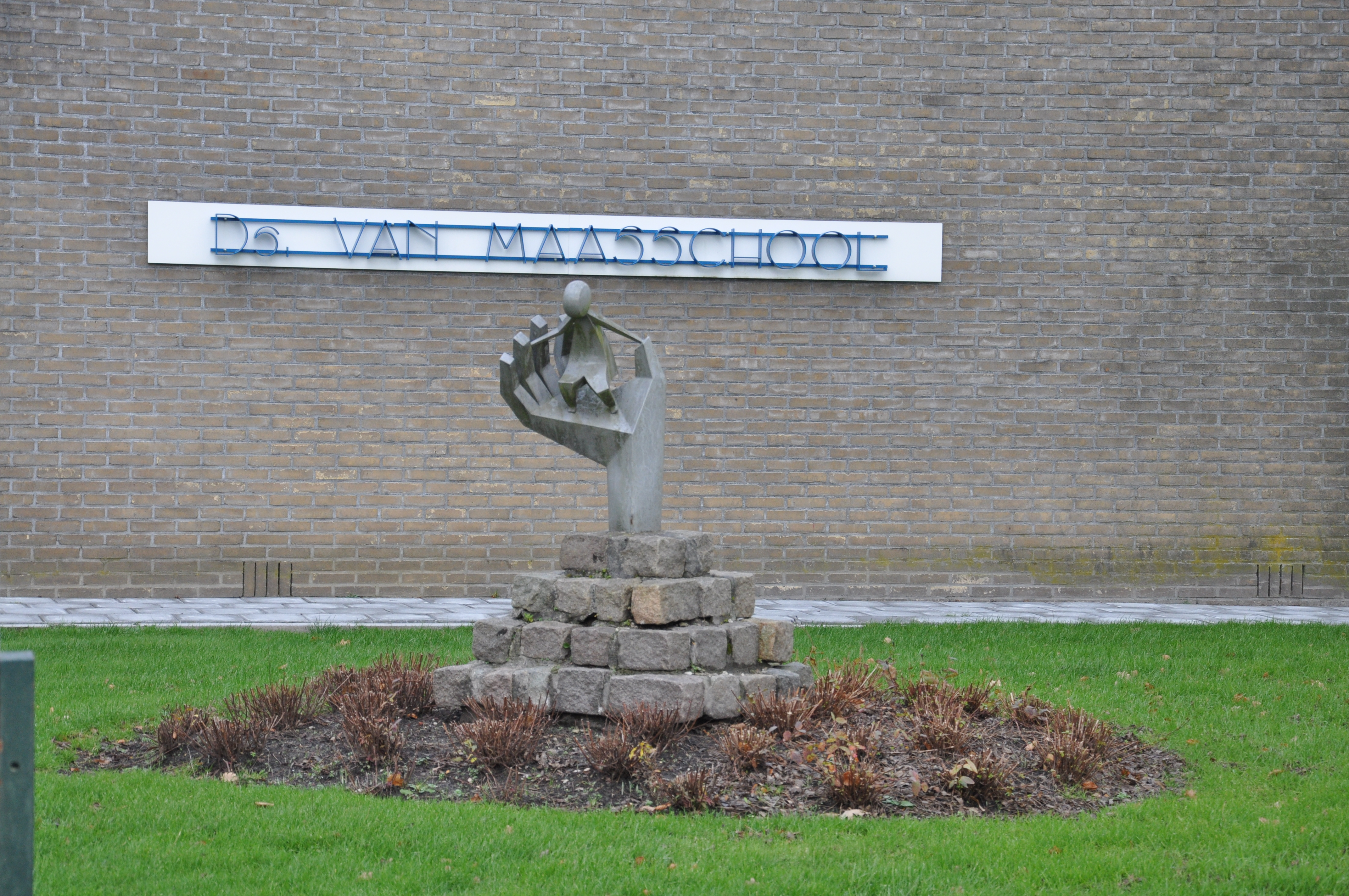 Beeld gereformeerde basisschool WapenveldUnknownUnknown reformed primary school at wapenveld